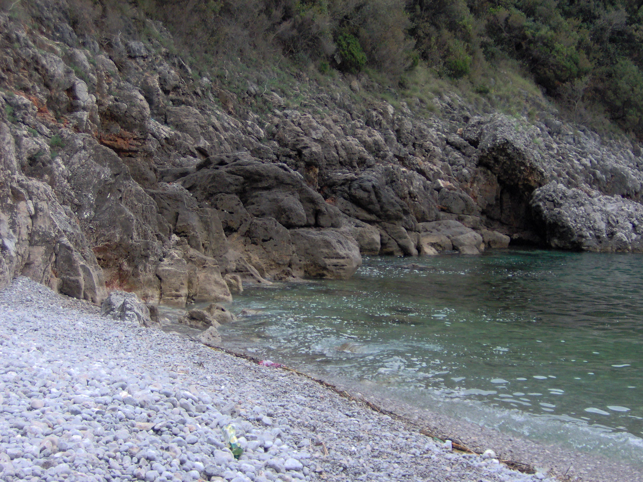 PLAZA NERIN